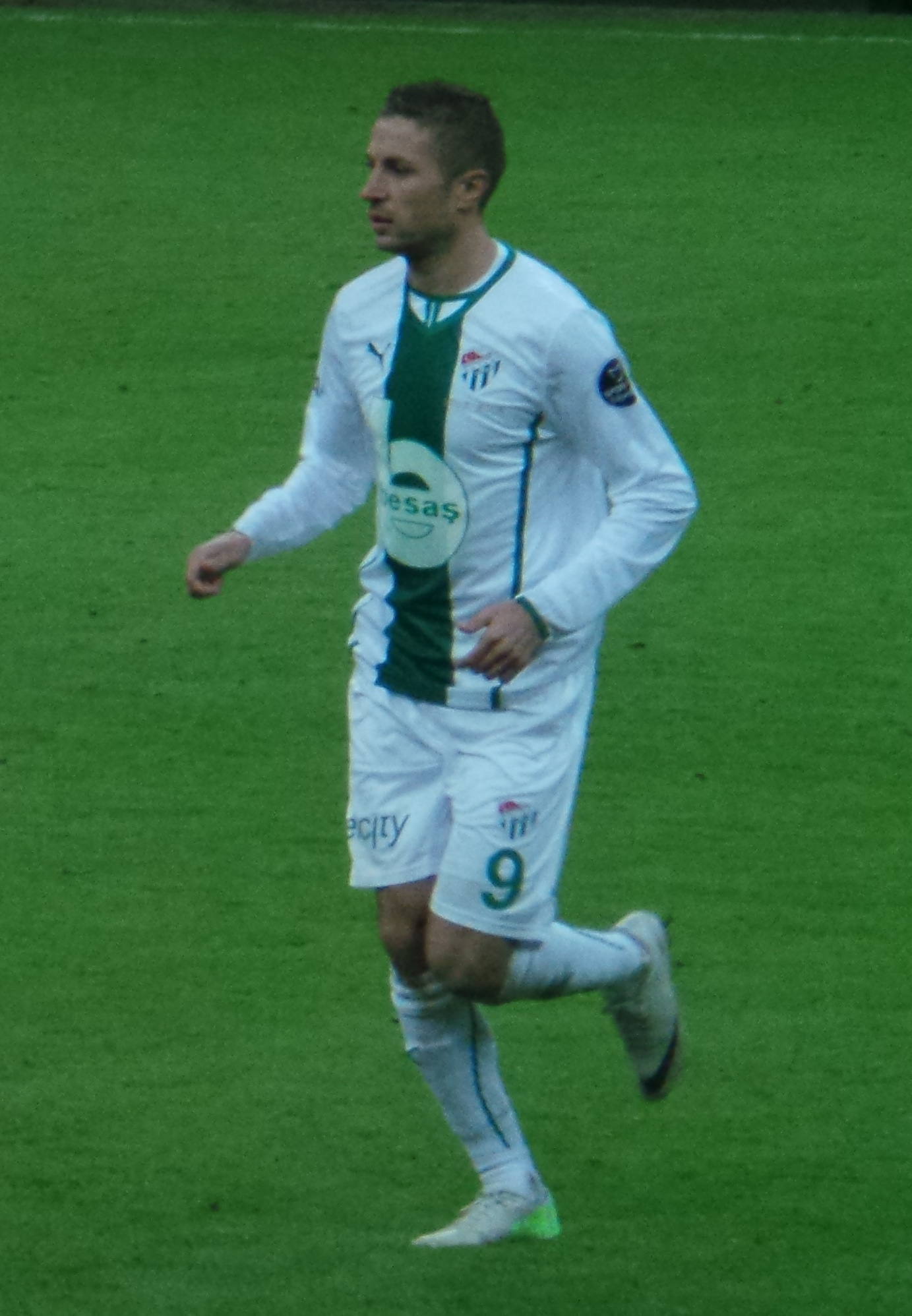 Stanislav Šesták vs Galatasaray